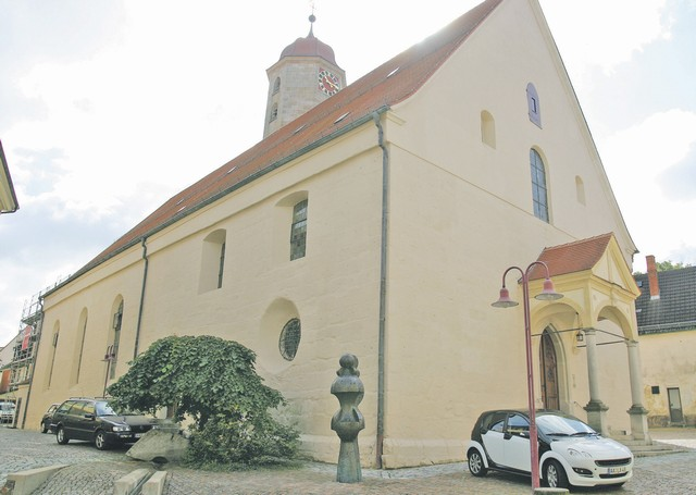 Marienkirche Ellwangen